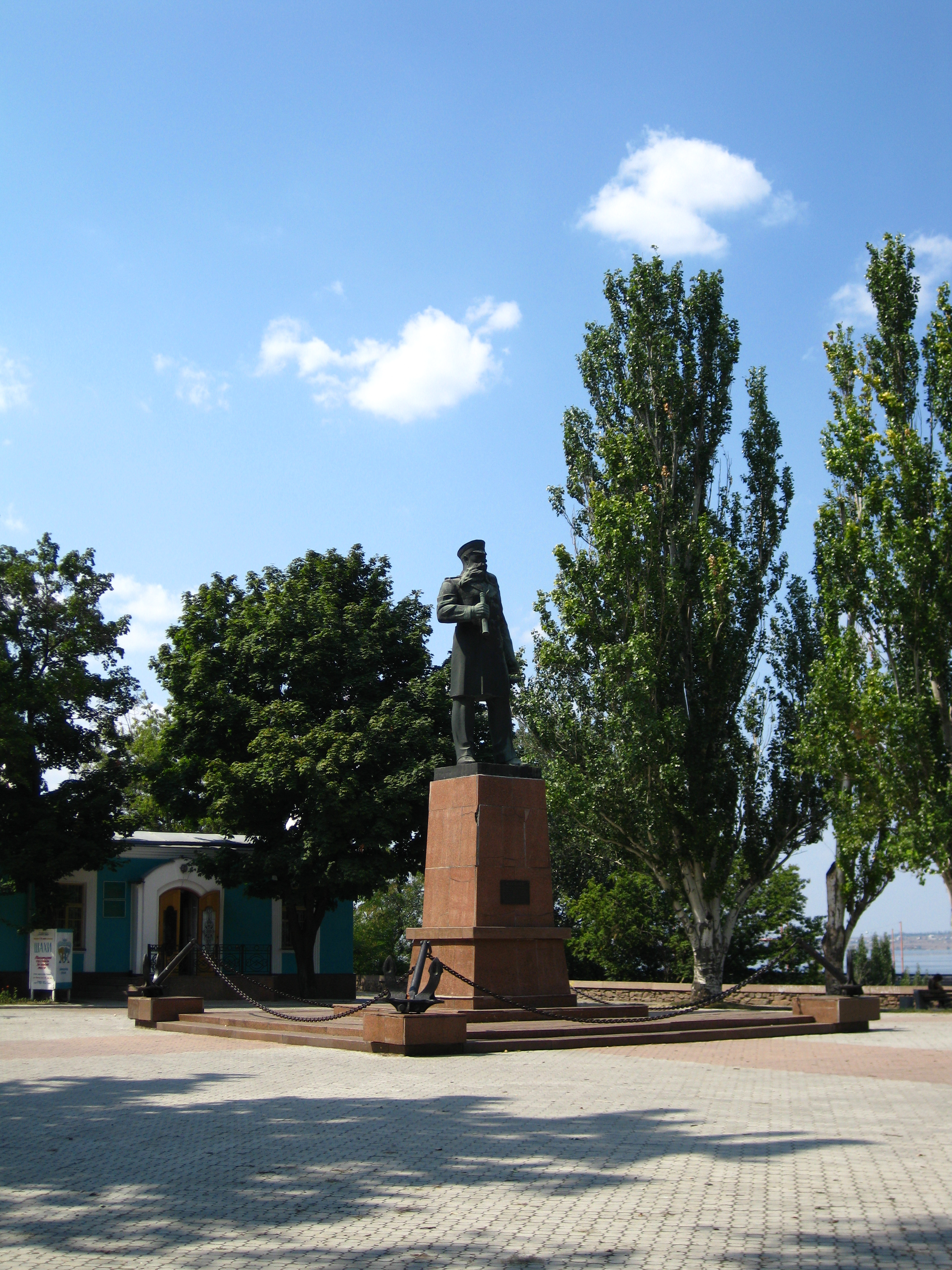 Памятник Адмиралу С. О. Макарову в Николаеве